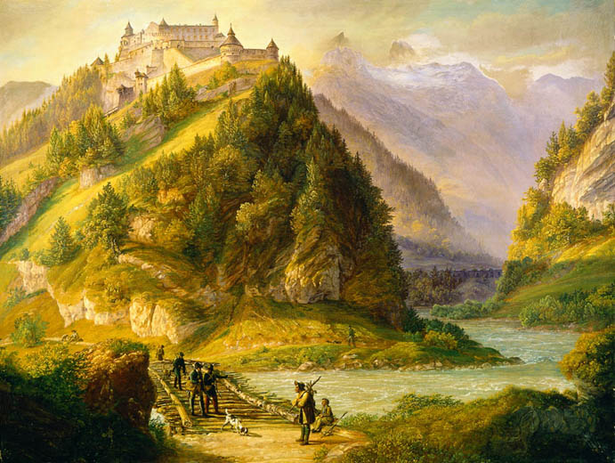 Festung Hohenwerfenlabel QS:Lde,"Festung Hohenwerfen"